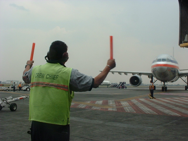 Rampero realizando la función de "marshaling"